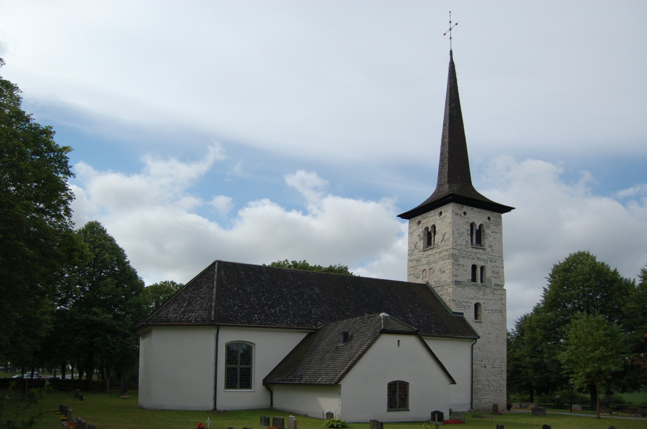 Hovsta kyrka från norrsida. Axbergs församling, Örebro.